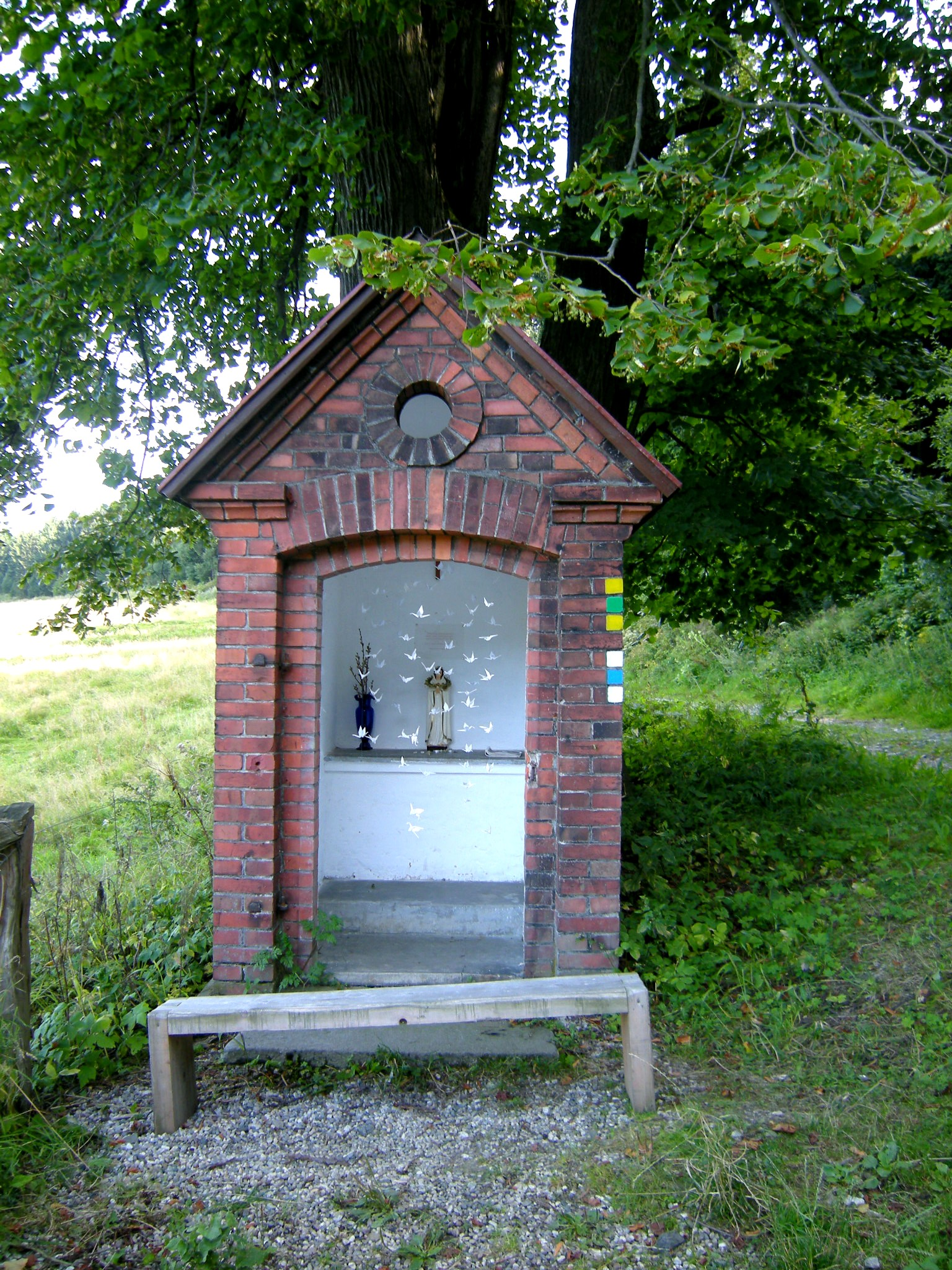 Kapliczka w pobliżu miejscowości Zálesí w Czechach